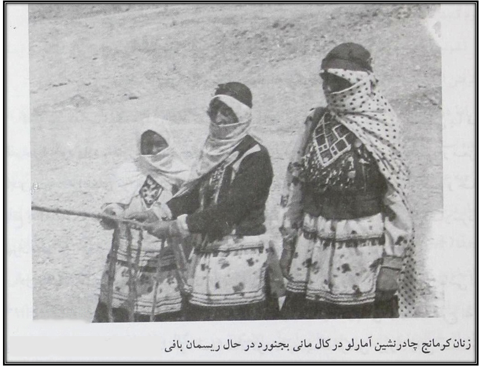 زنان از قوم عمارلو میباشند